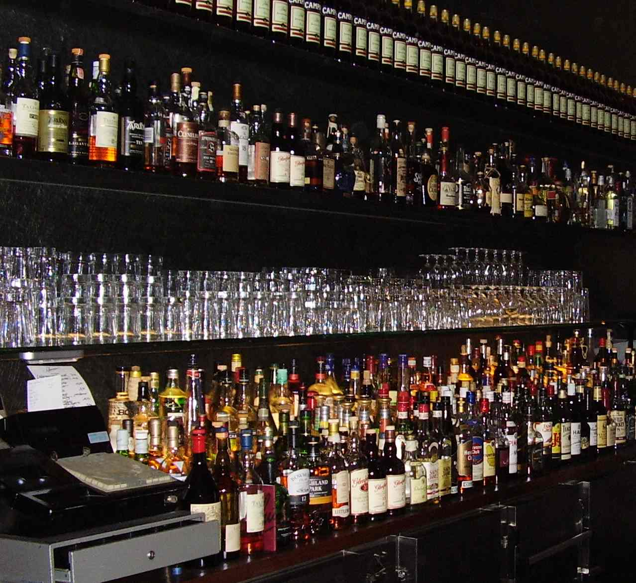 Innenraum der Bar "Schumann's" in München, Odeonsplatz